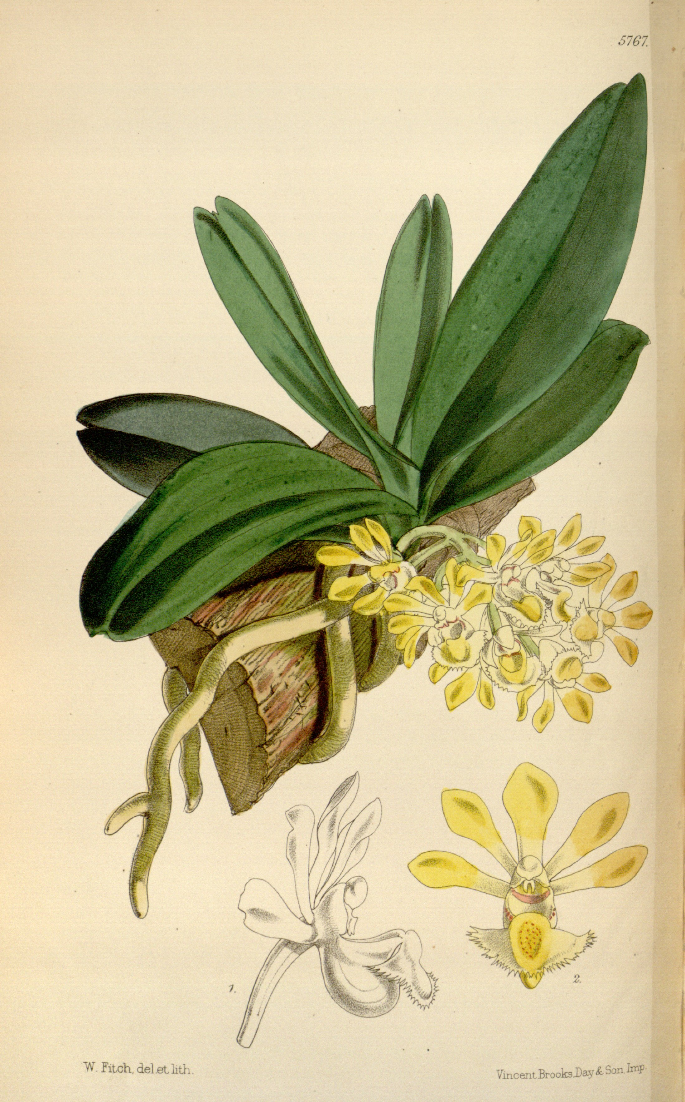 Illustration of Gastrochilus obliquus var. obliquus (as syn. Saccolabium bigibbum)